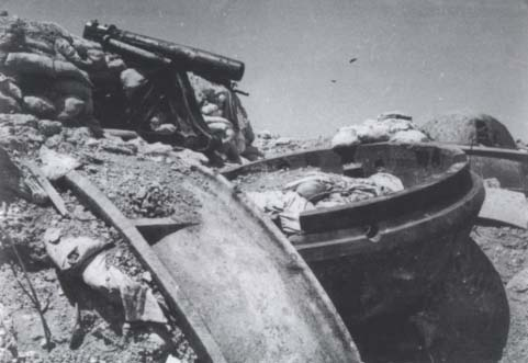 Zerstörte Turmhaubitzen im Werk Lusern